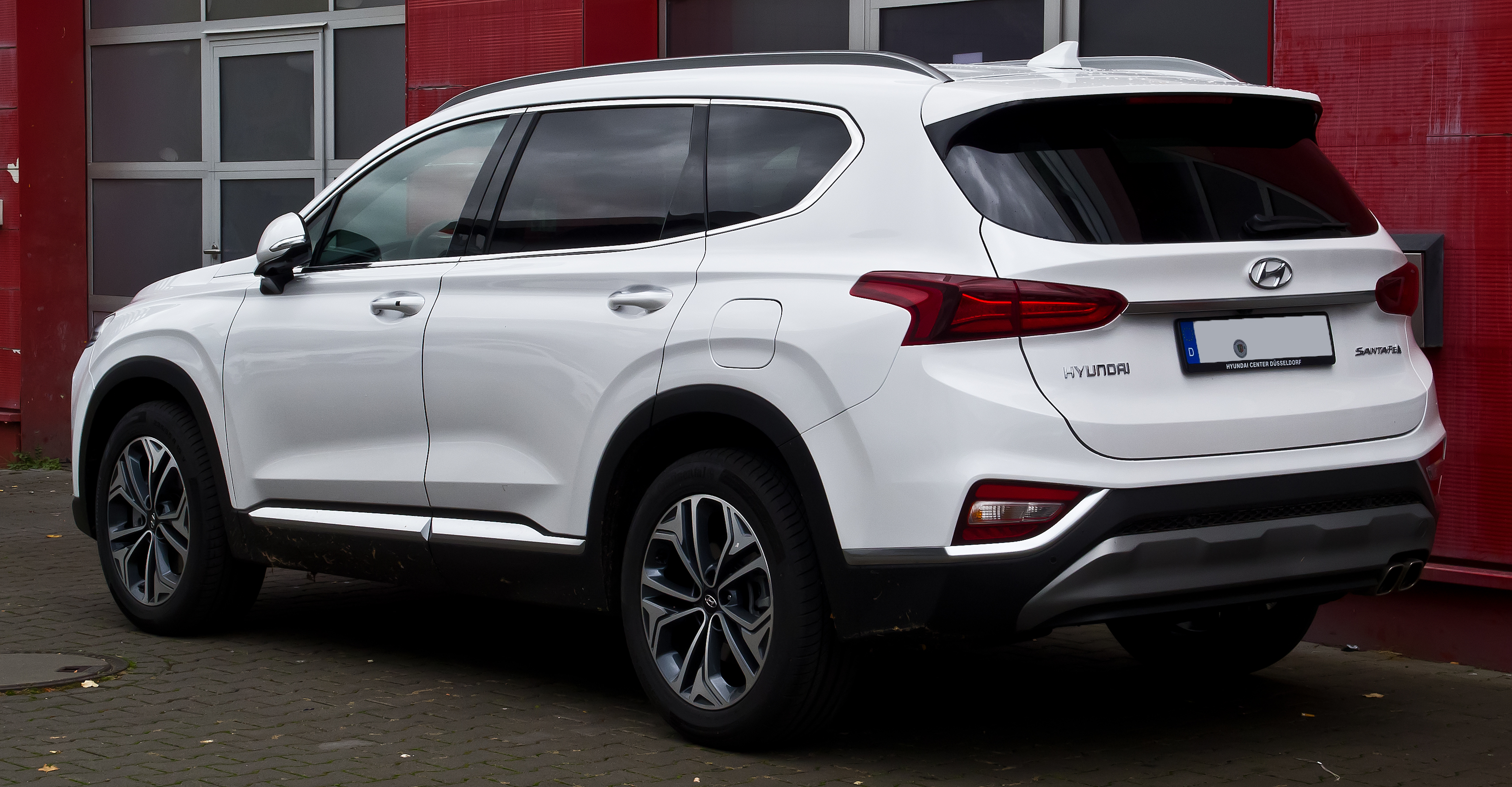 Hyundai Santa Fe 2.2 CRDi 4WD Premium (IV)